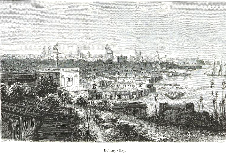 Capitaine Baudin en Australie ː Arthur Mangin, Voyages et Découvertes outre-mer au XIXe siècle, illustrations par Durand-Brager, 1863 ː Botany-Bay.